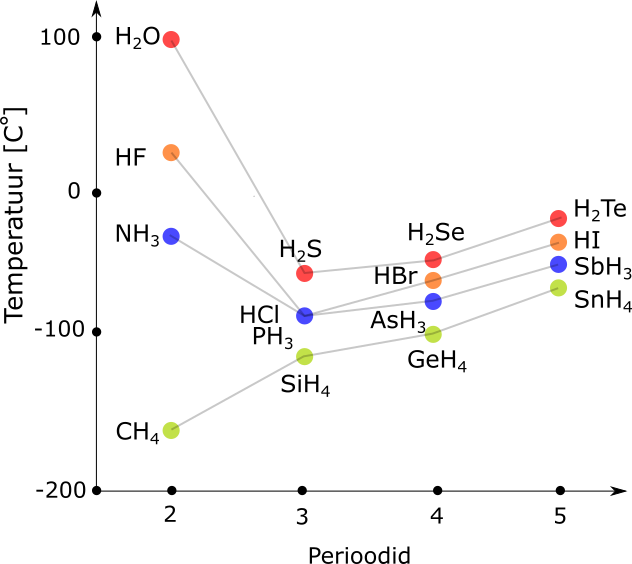 Binaarsete vesinik(I) ühendite keemistemperatuurid